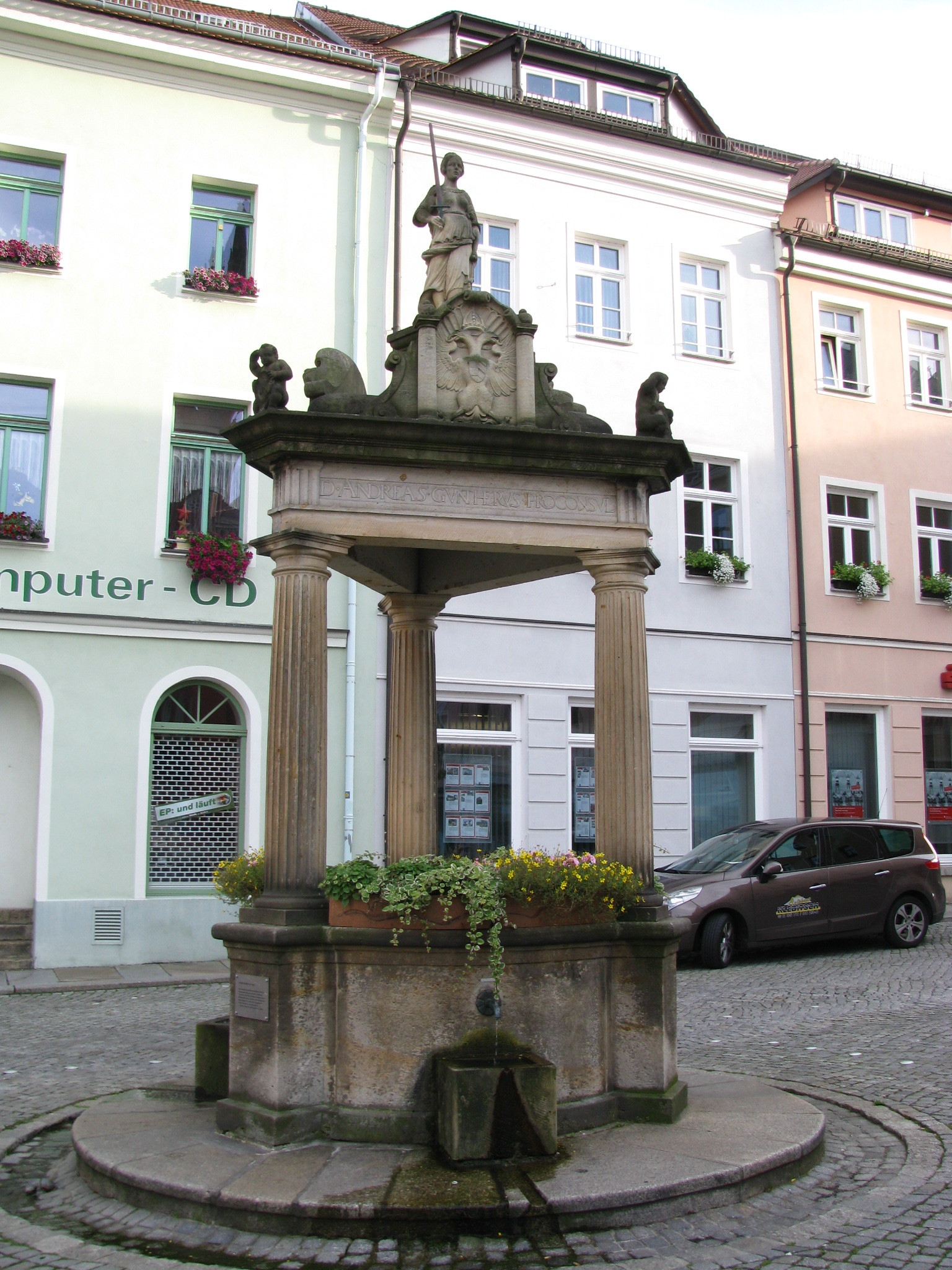 Der Andreasbrunnen auf dem Kamenzer Marktplatz wurde nach seinem Stifter, dem Bürgermeister Andreas Günther, benannt. Der Andreasbrunnen wird stadtgeschichtlich mit dem Oberlausitzer Pönfall im Jahre 1547 in Verbindung gebracht, bei dem Kamenz und die weiteren fünf zum Oberlausitzer Sechstädtebund gehörenden Städten viele Privilegien, darunter das Marktrecht, entzogen wurden. Die schrittweise Wiedererlangung dieser Privilegien wird Günther zugeschrieben. Der Andreasbrunnen besteht aus drei toskanischen Säulen, die einen baldachinartigen Aufbau tragen auf dem Justitia mit Schwert und Waage steht. An den drei Seiten sind die Wappen der Stadt Kamenz, des Königreiches Böhmen und des Deutschen Reiches angebracht.